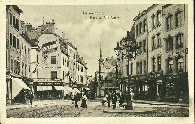 La place du Puits-Rouge (Roude Pëtz) à la bifurcation Grand-Rue, et rue Genistre (vers 1915)